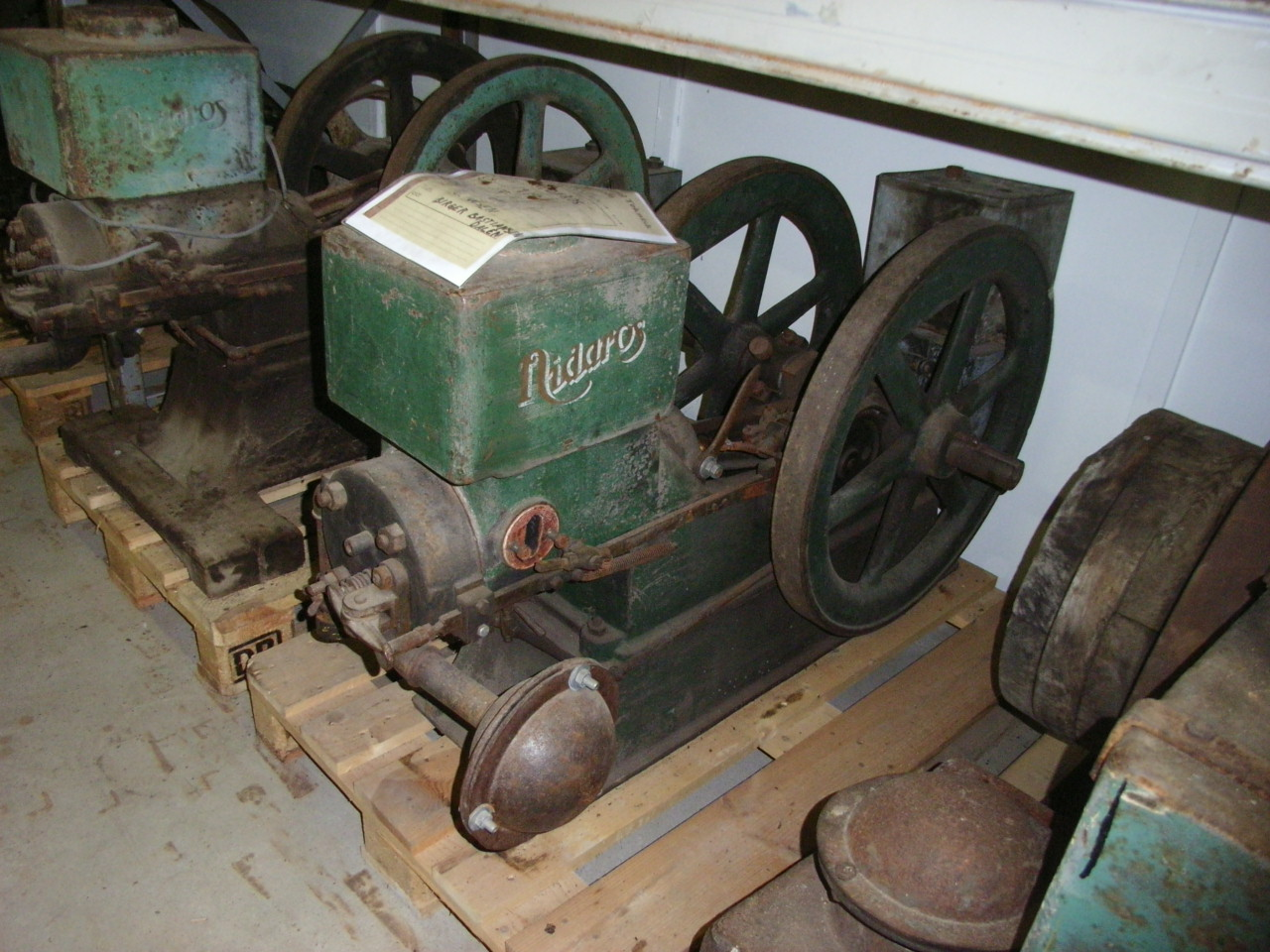 Ein gamal Nidaros stasjonærmotor, plassert på Norsk traktor og motormuseum.